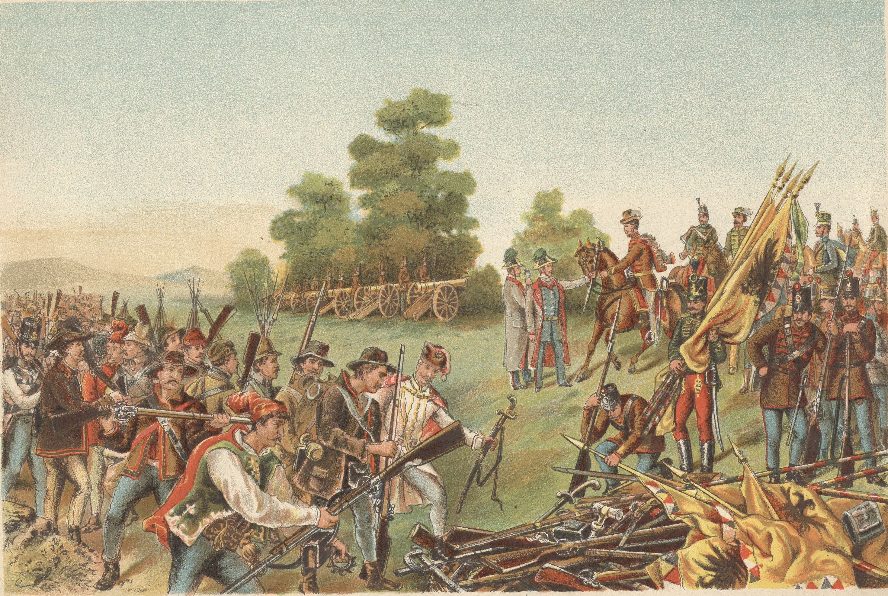 Az ozorai fegyverletétel